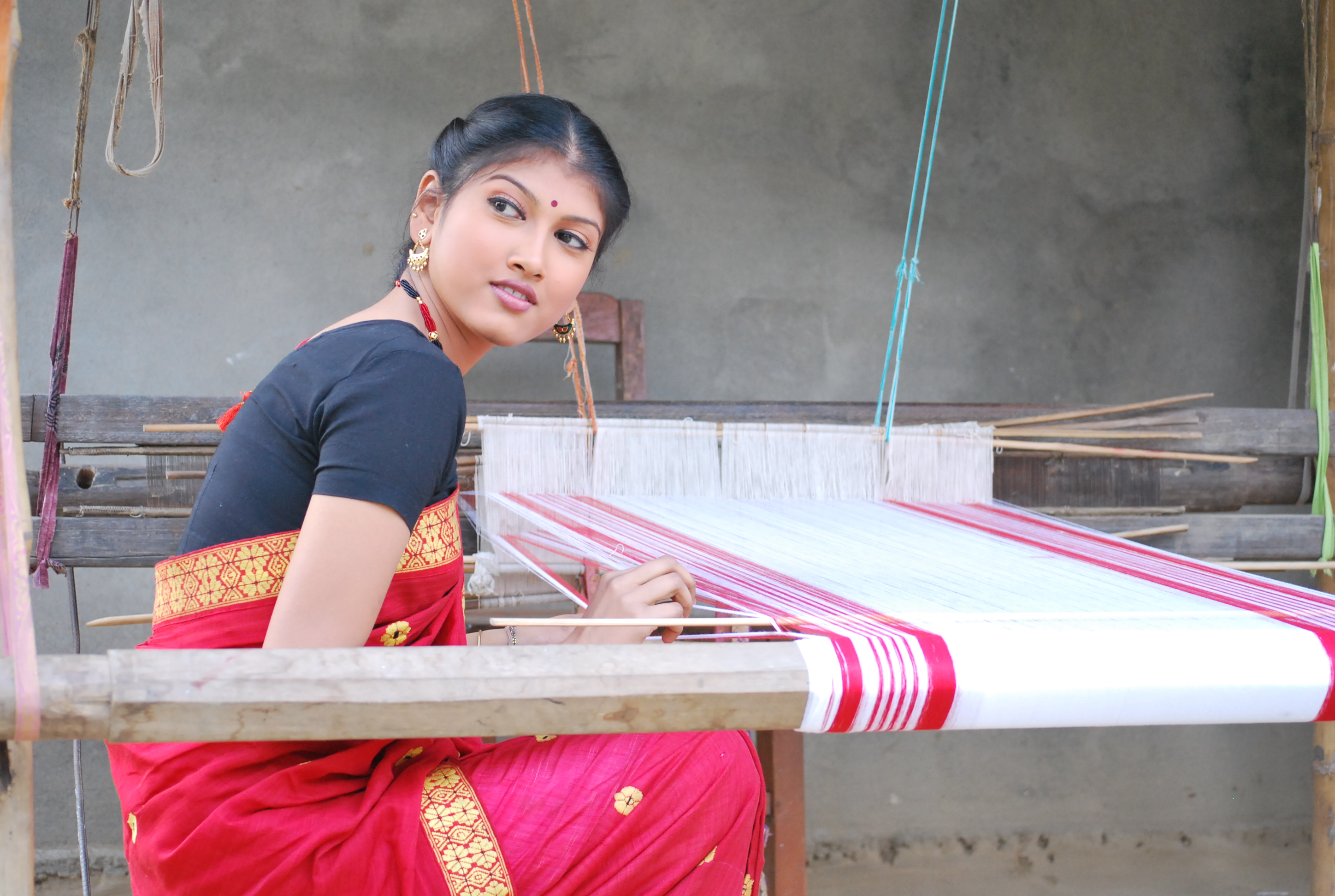 অসমীয়া: এগৰাকী আসমীয়া গাভৰুৱে তাঁতশালত ব্যস্ত।